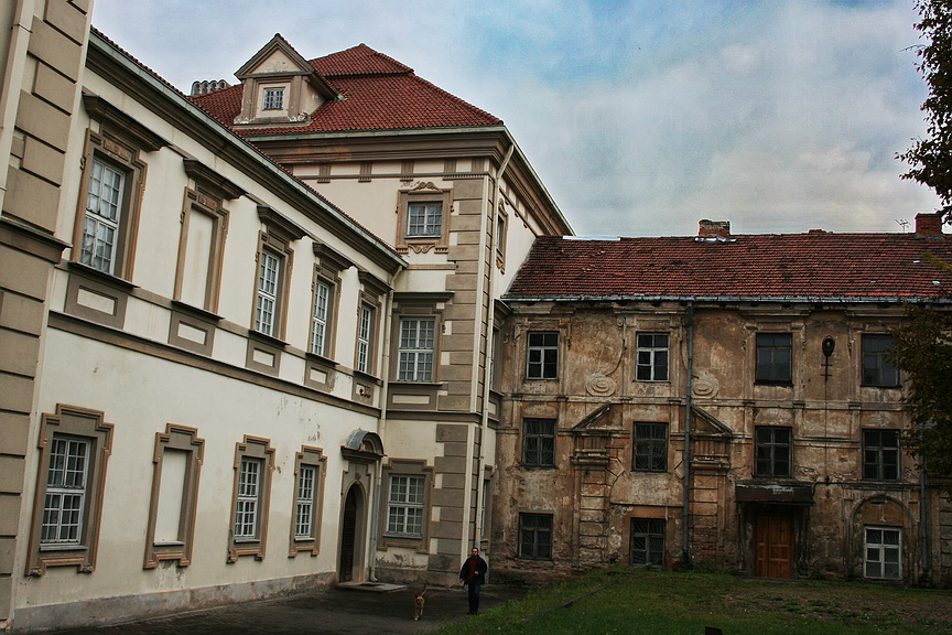 Radvilos Palace, Vilnius